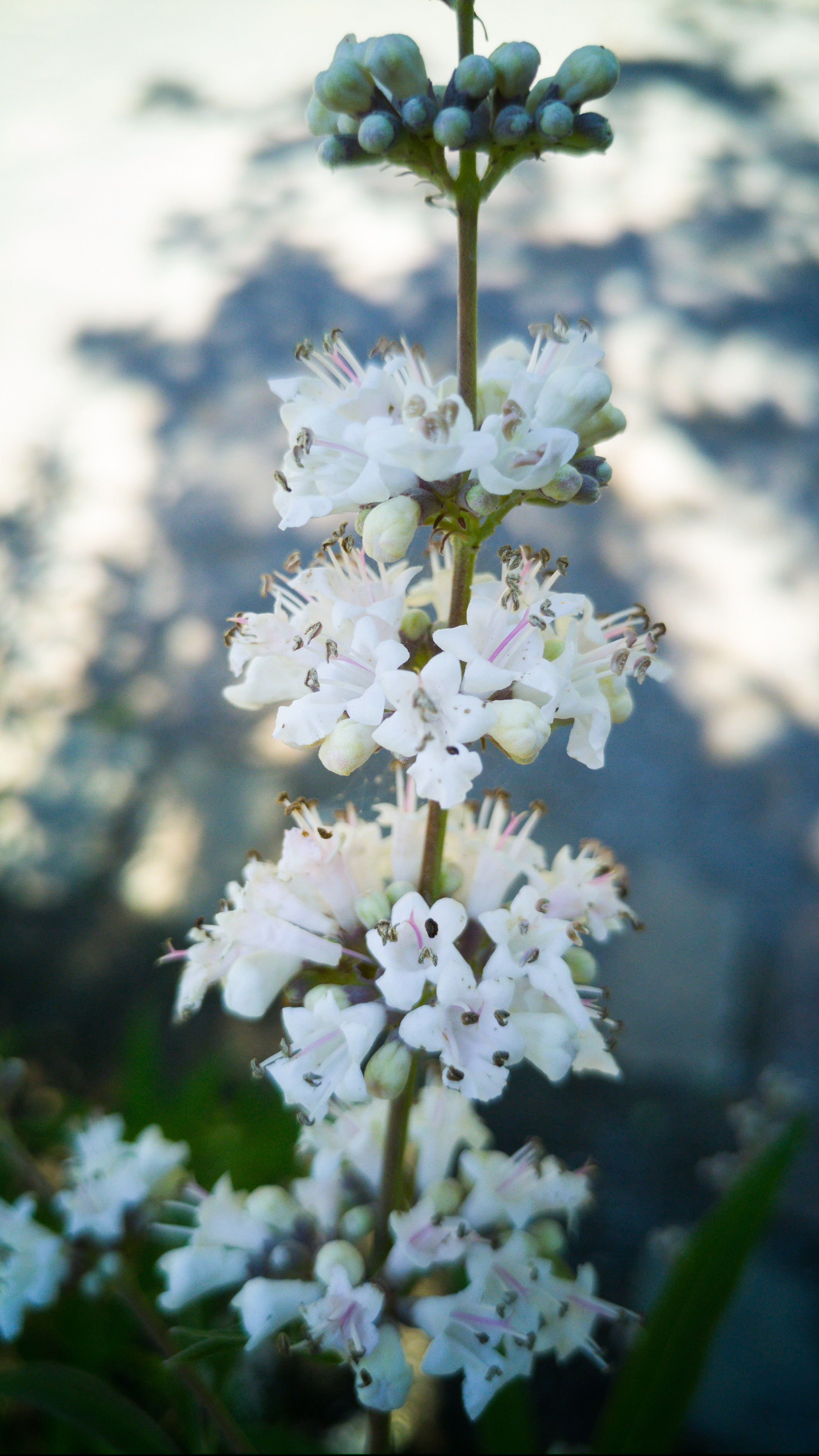 Der Mönchspfeffer, lat. Vitex agnus-castus